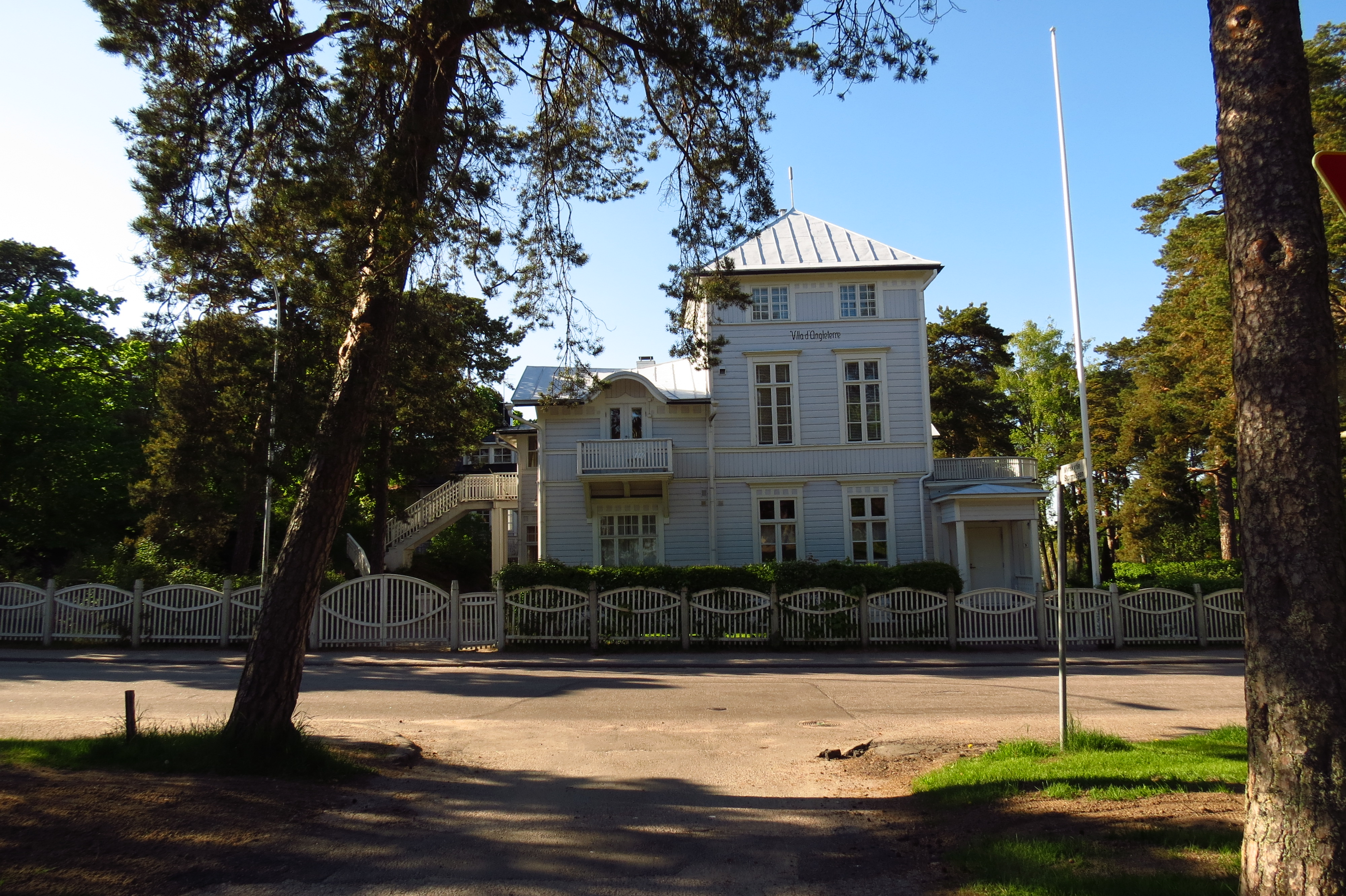 Villa d'Angleterre (kuva: 2016)